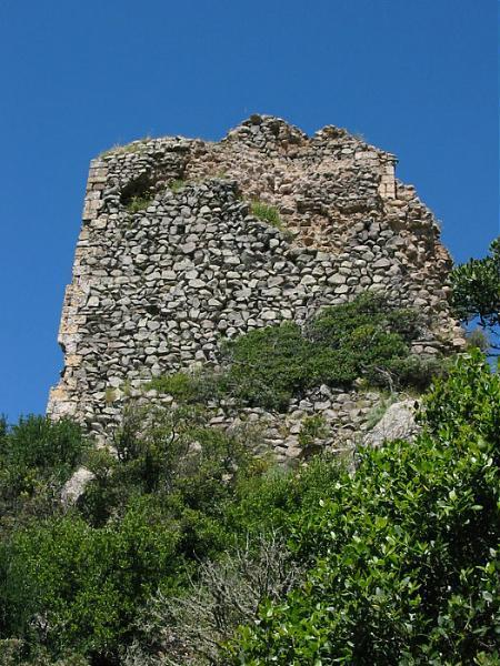 Castello di Gioiosaguardia, Villamassargia